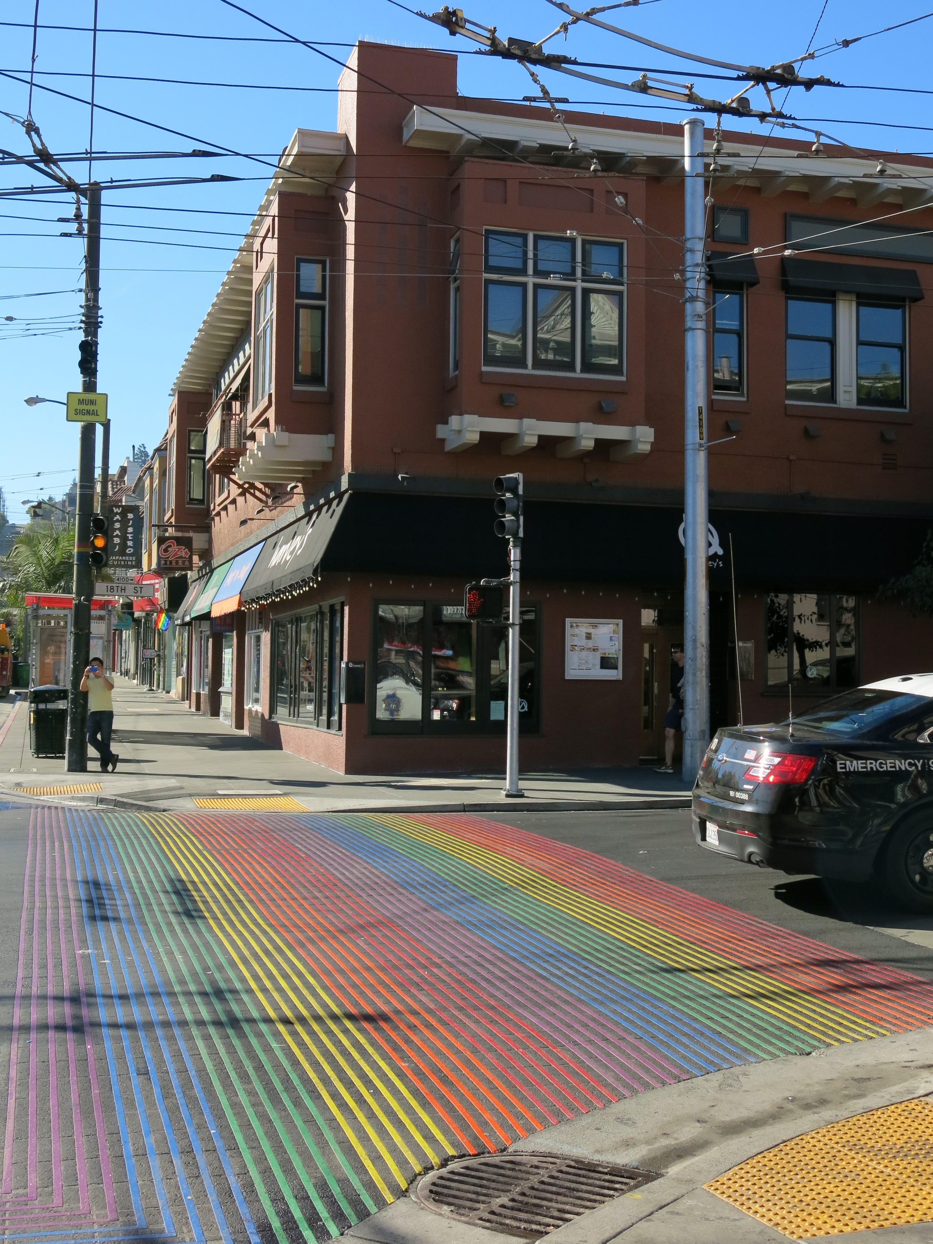 Pedcrossing with Rainbow Flag Colours in The Castro San Francisco